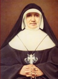 Reine Antier - fondatrice de la congrégation des petites soeurs de l'Enfant-Jésus de Chauffailles